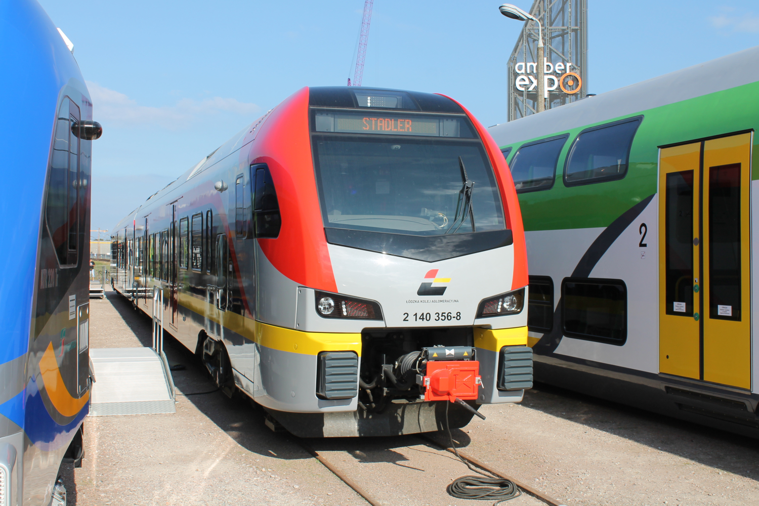 Elektryczny zespół trakcyjny Stadler FLIRT3 dla Łódzkiej Kolei Aglomeracyjnej podczas targów Trako 2015. The making of this document was supported by Wikimedia Polska Association, within Wikigrant no. WG 2015-34. English | polski | +/−